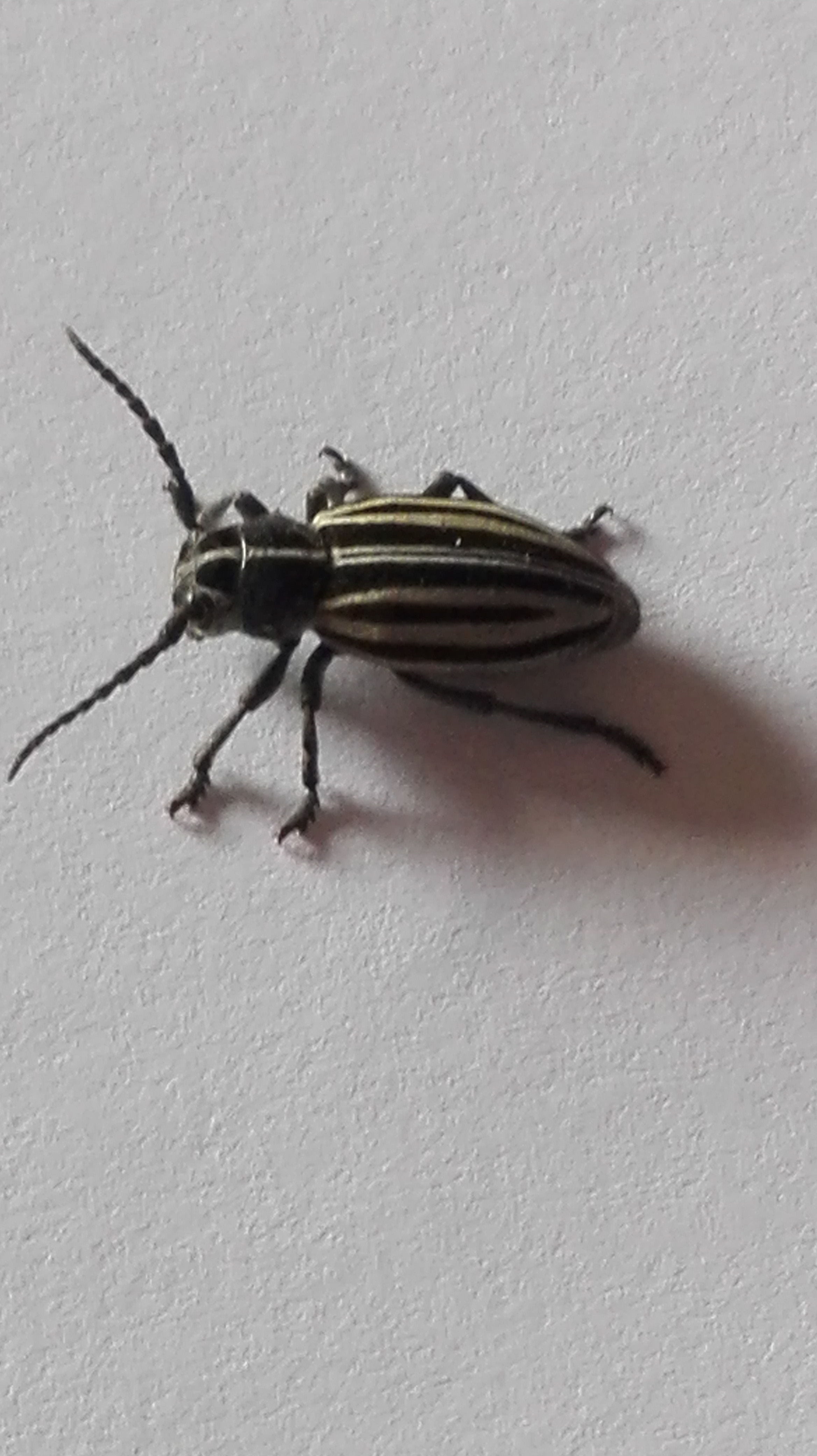 Dorcadion scopolii